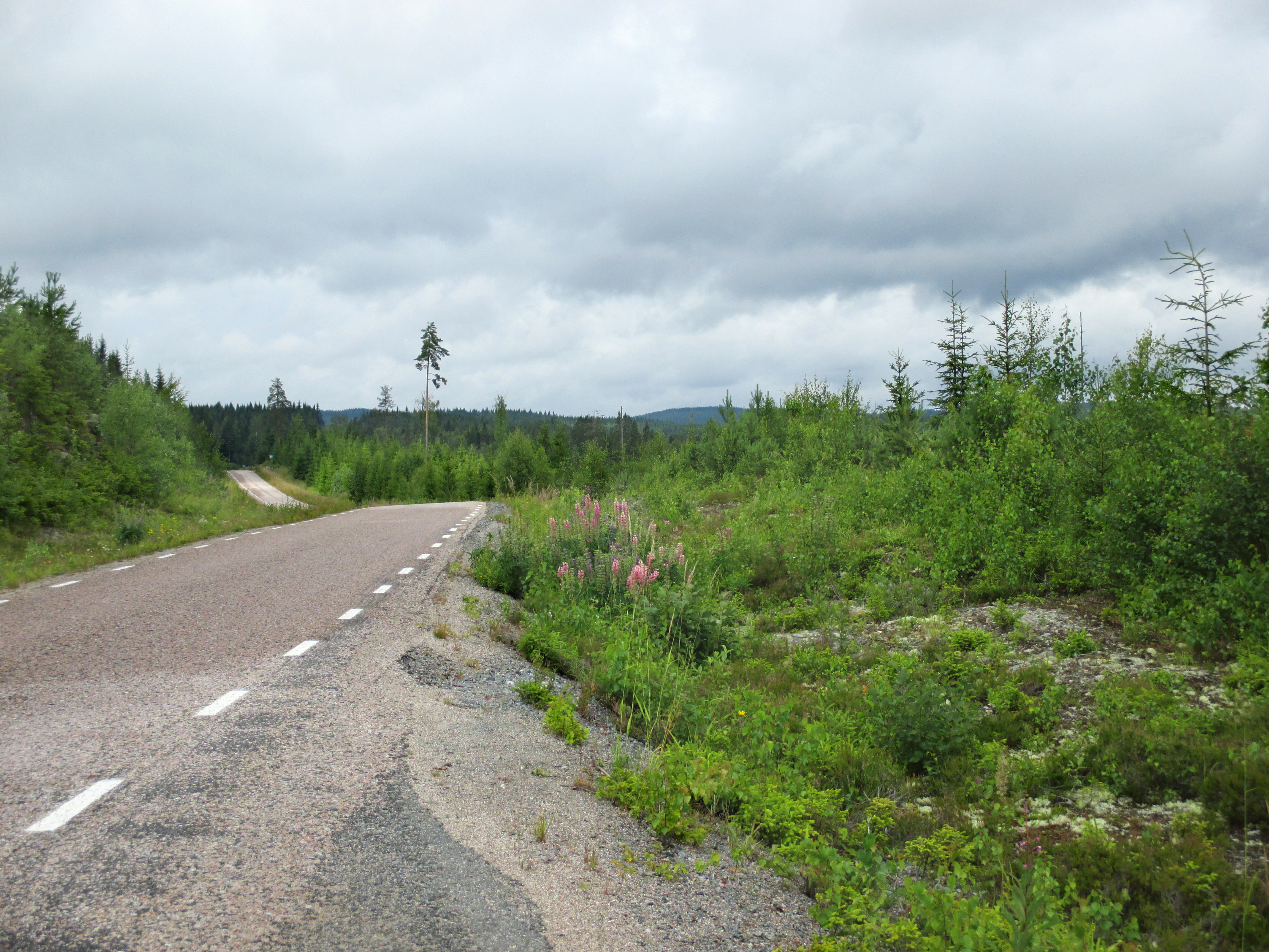 Länsväg X543 mellan Källsjön och Lövtjärn vid Bondsvedsberget och Bastusveden, Ockelbo kommun, Gästrikland, Gävleborgs län, Sverige. Närmaste bebyggelse är Övre Knottåsen 1,0 km åt VNV. I vägdiket mitt i bild ses blommande lupiner (Lupinus sp.).